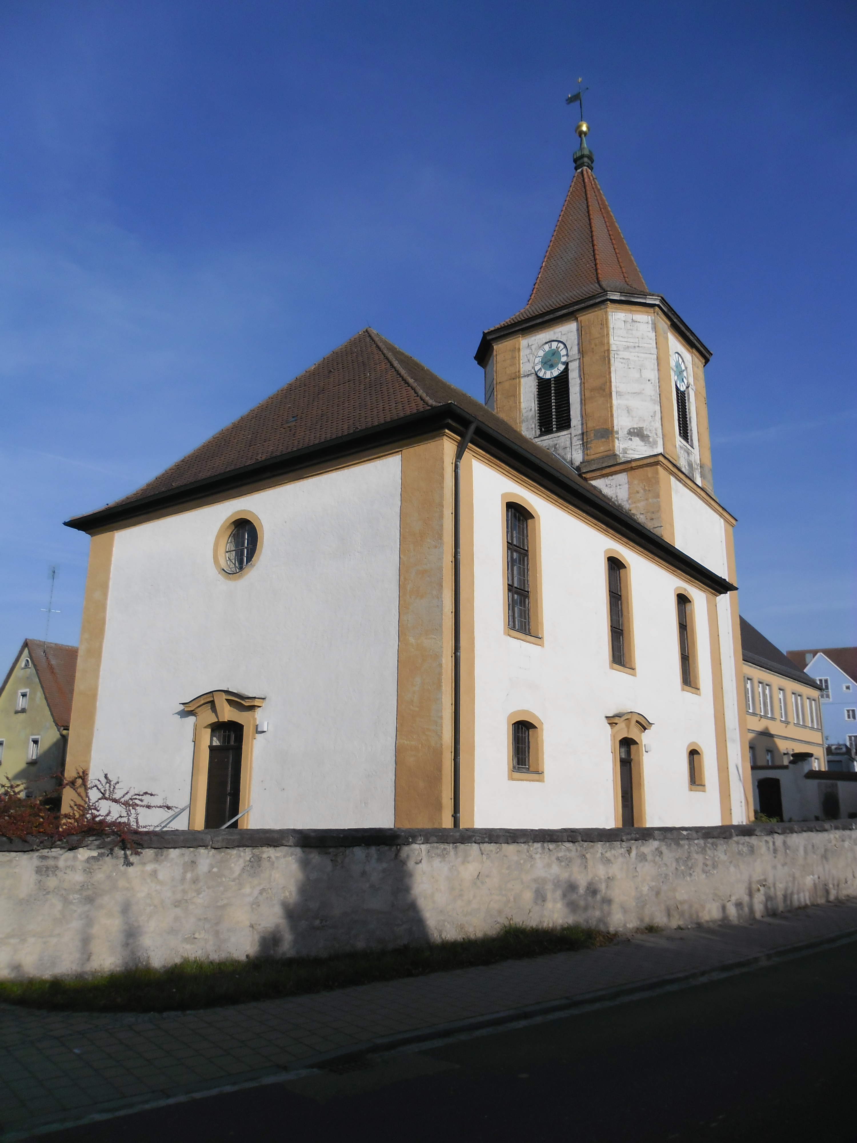 Pfarrkirche St. Martin (Alfershausen 1) mit Langhaus von 1742 und Turmsockel aus dem Spätmittelalter